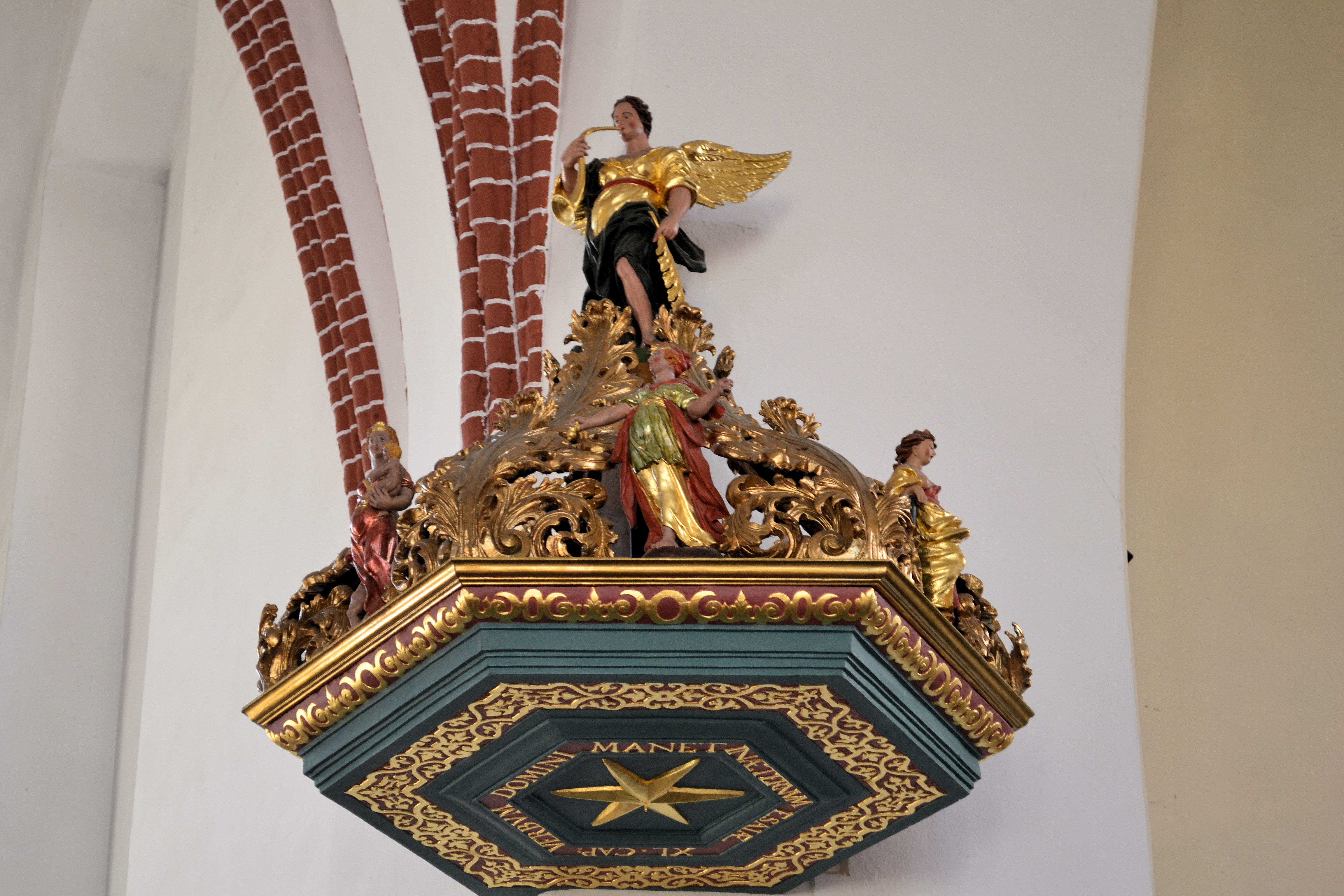 Kościół Narodzenia Najświętszej Maryi Panny w Gryfinie